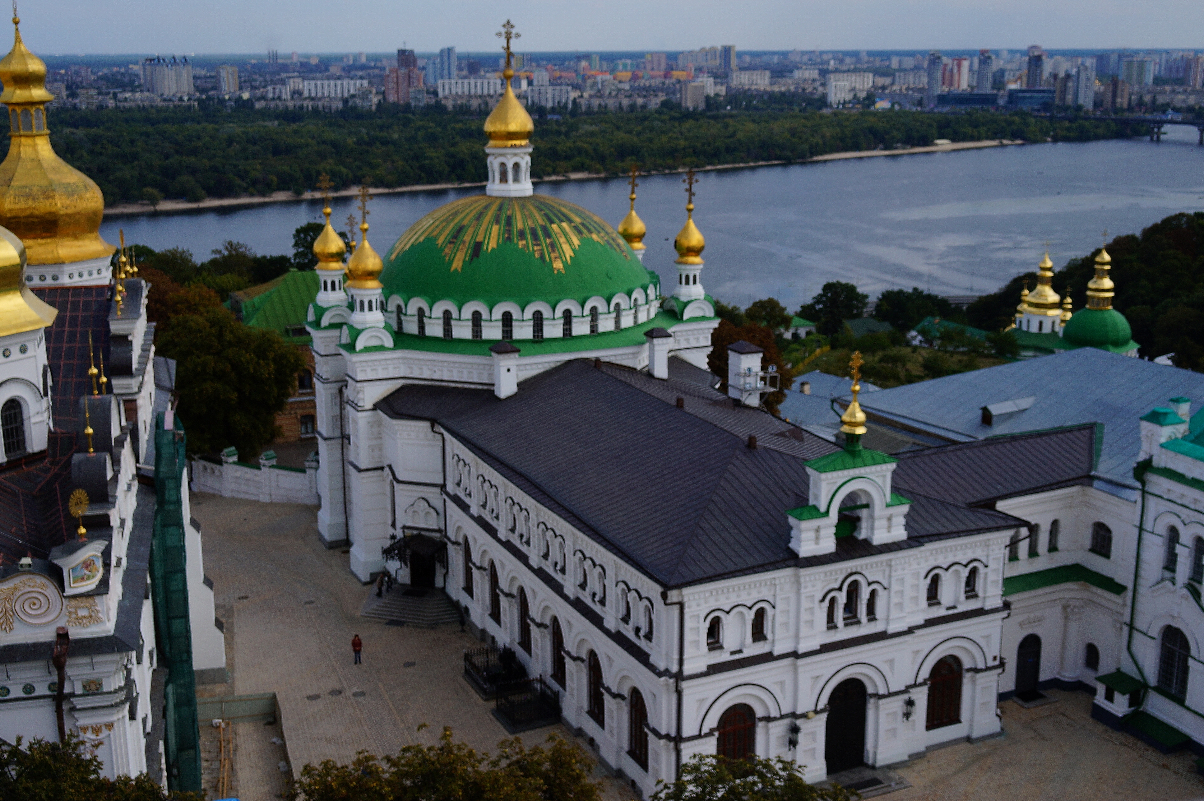 Палата трапезна з церквою Антонія і Феодосія, Київ, Лаврська вул., 9